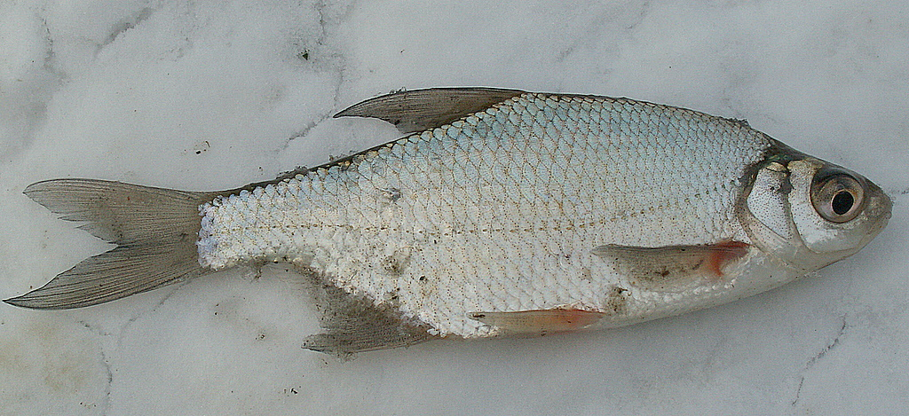 {InformationMiddelgroot exemplaar van de Kolblei (Blicca bjoerkna)